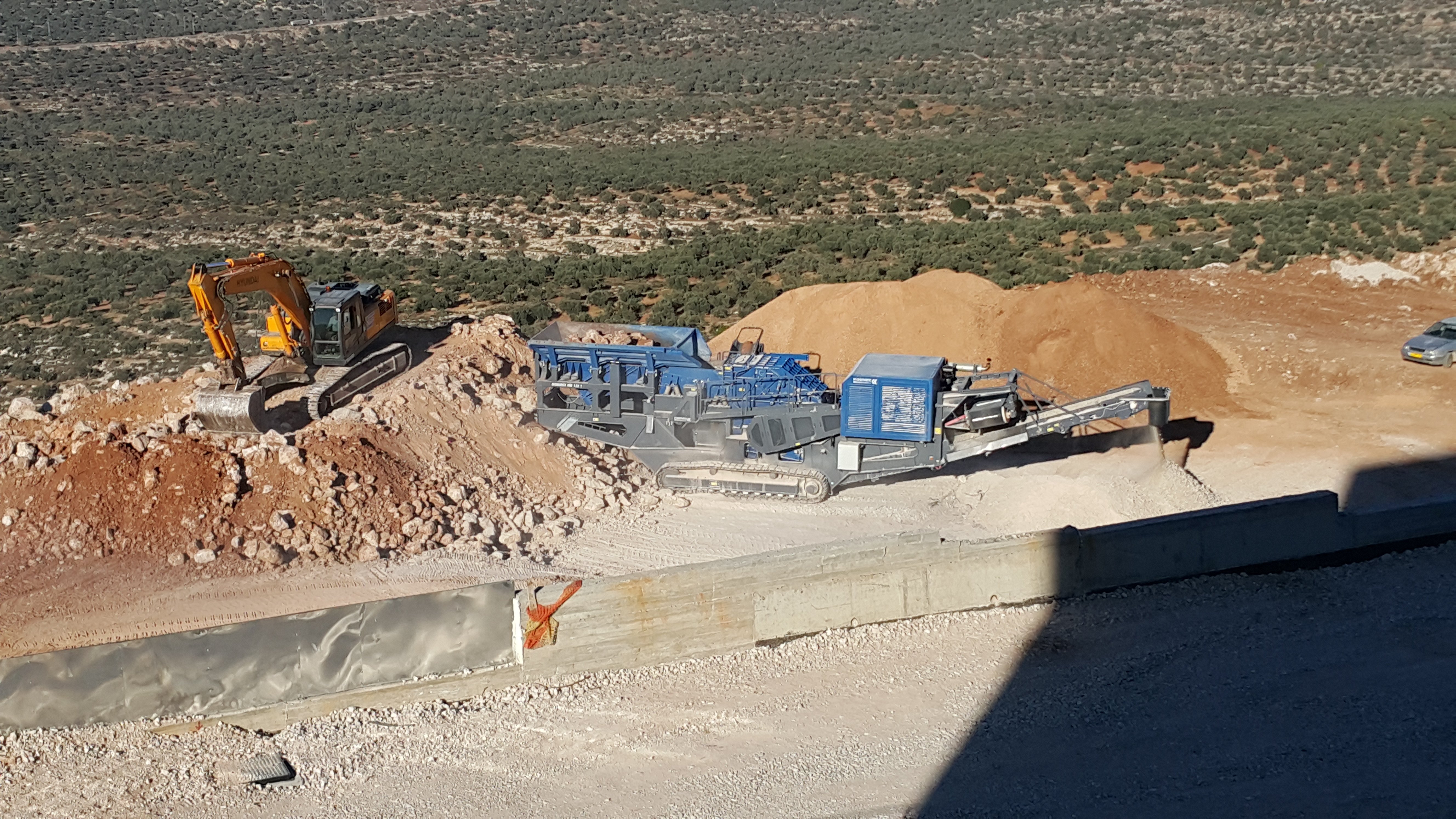 מכונה לייצור חצץ